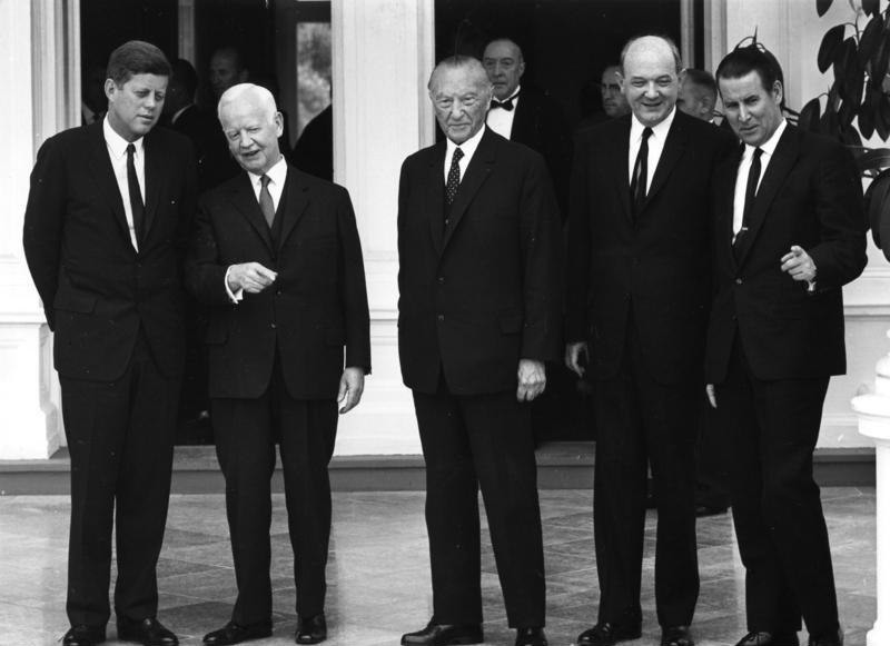 Besuch des amerikanischen Präsidenten John F. Kennedy am 23. Juni 1963 in Bonn Vor der Villa Hammerschmidt, dem Amtssitz des Bundepräsidenten vlnr: US-Präsident John F. Kennedy, Bundespräsident Heinrich Lübke, Bundeskanzler Dr. Konrad Adenauer, die Außenminister Dean Rusk und Dr. Gerhard Schröder